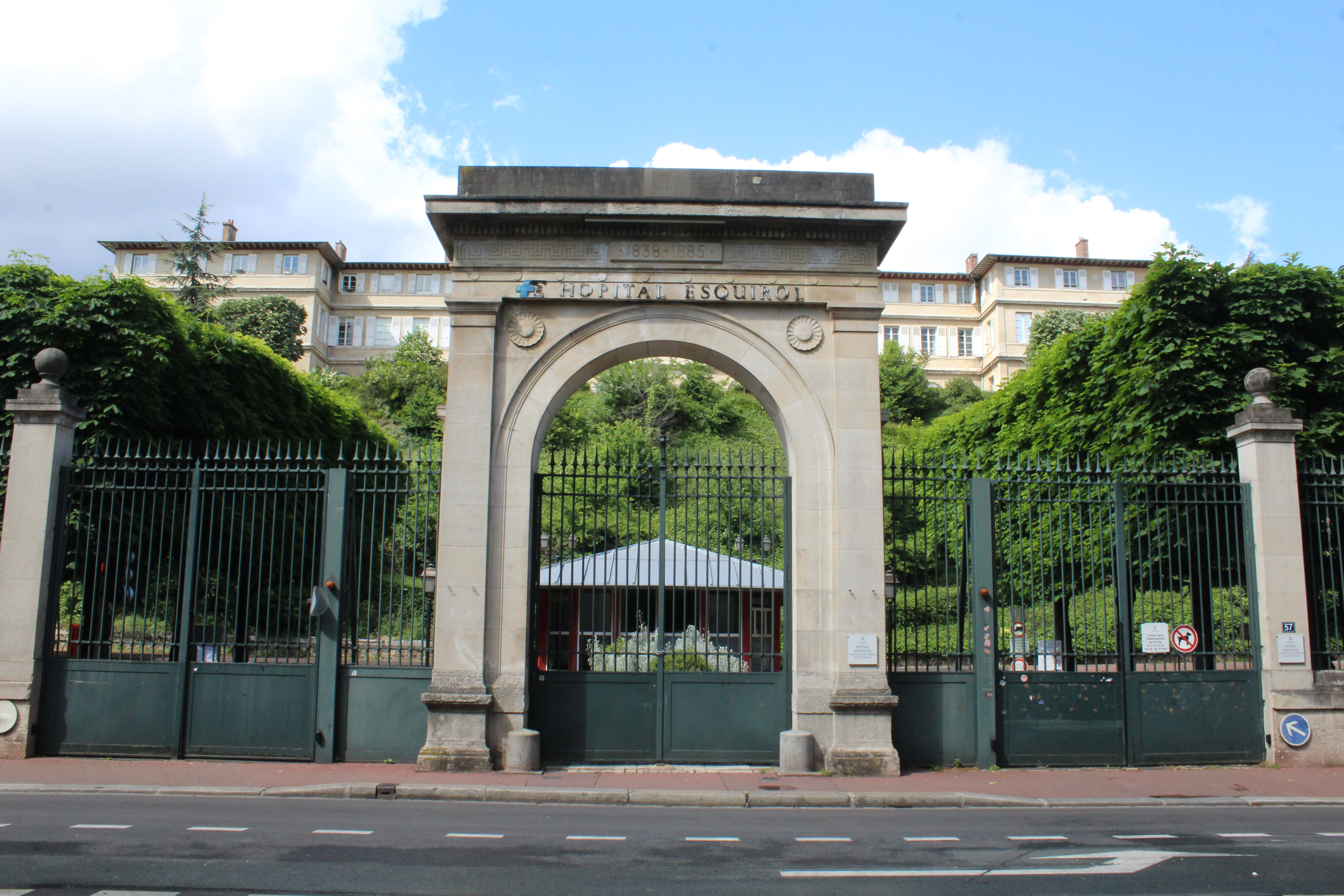 Portail de l'hôpital Esquirol, Saint-Maurice, Val-de-Marne.